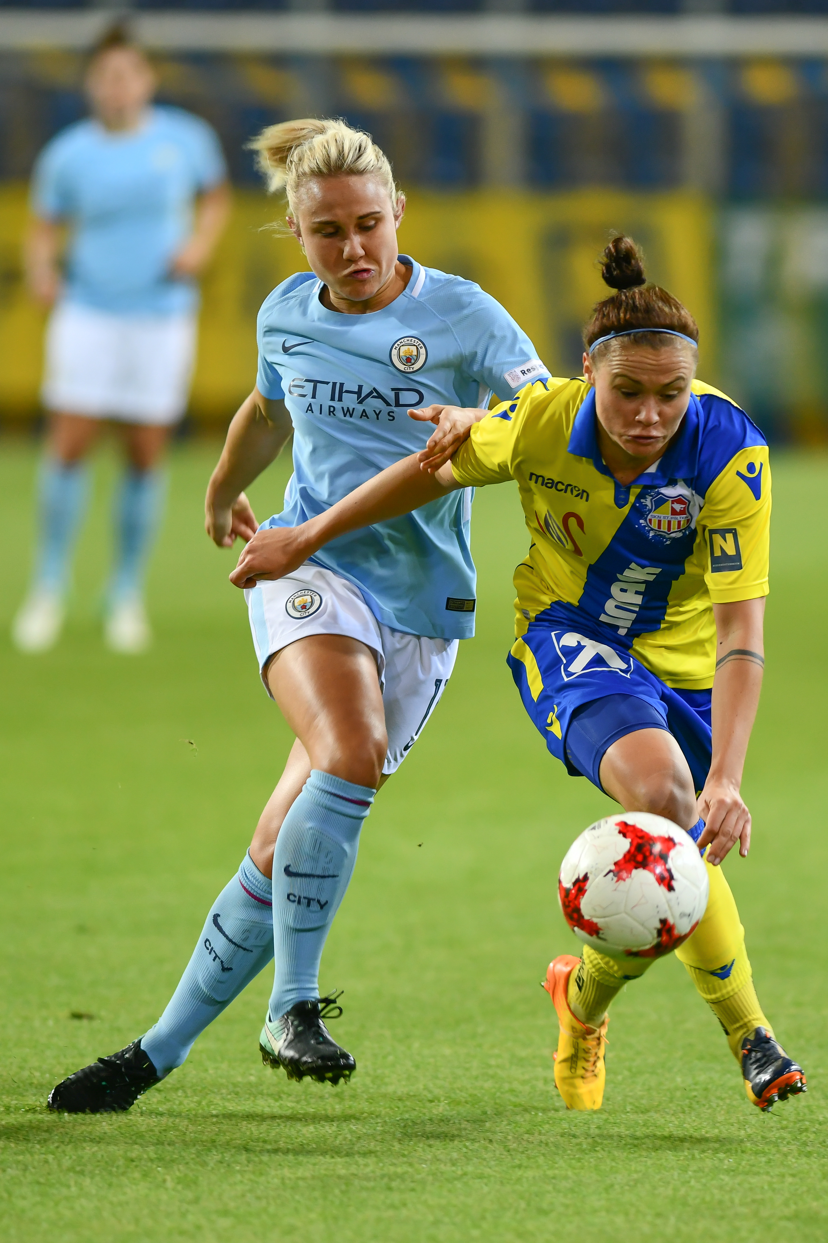 UEFA Women's Champions League 2017/18, Runde der letzten 32, SKN St. Pölten gegen Manchester City W.F.C. am 4.10.2017, Bild zeigt: Stefanie Enzinger (31, SKN), Izzy Christiansen (11, MCW)